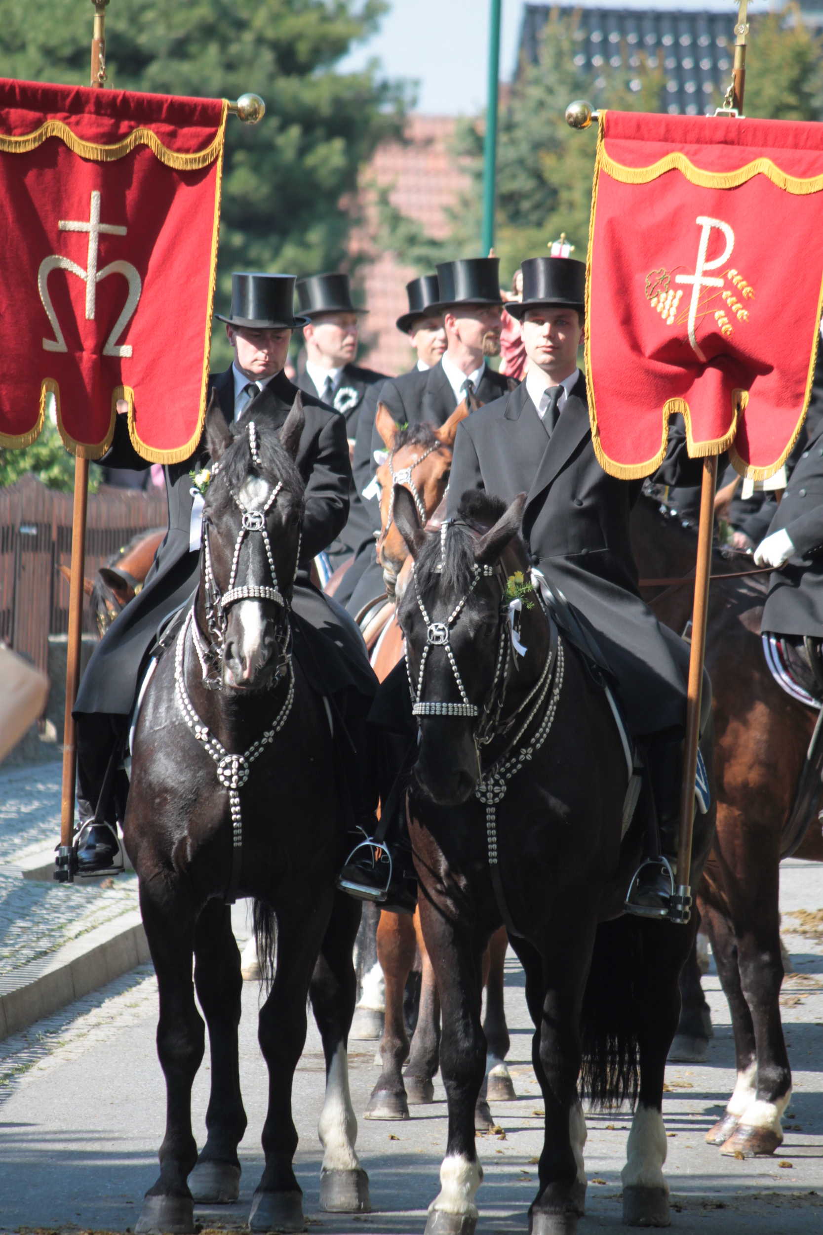 Ostroer Osterreiter in Nebelschütz, Landkreis Bautzen, Sachsen. Hornjoserbsce: Wotrowscy křižerjo w Njebjelčicach.